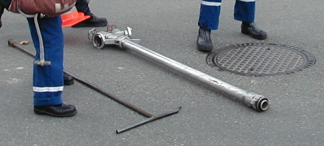 Schieberschlüssel, und Standrohr bereitgelegt am Württemberger Schachthydrant